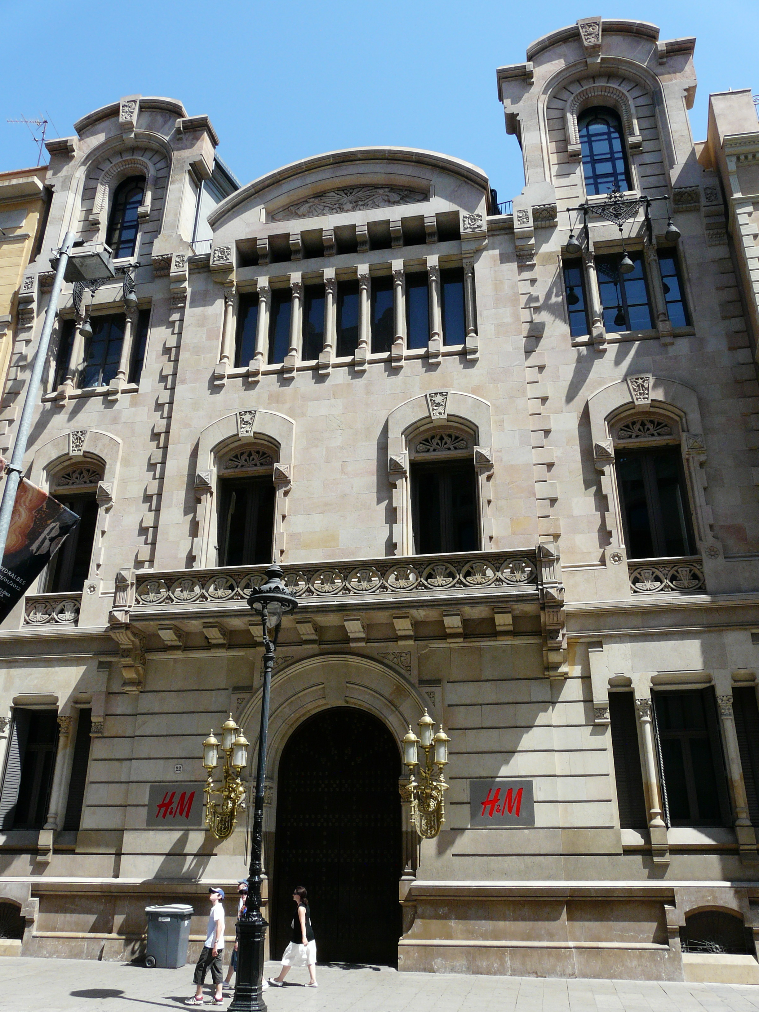 Catalana de Gas i Electricitat (Barcelona)